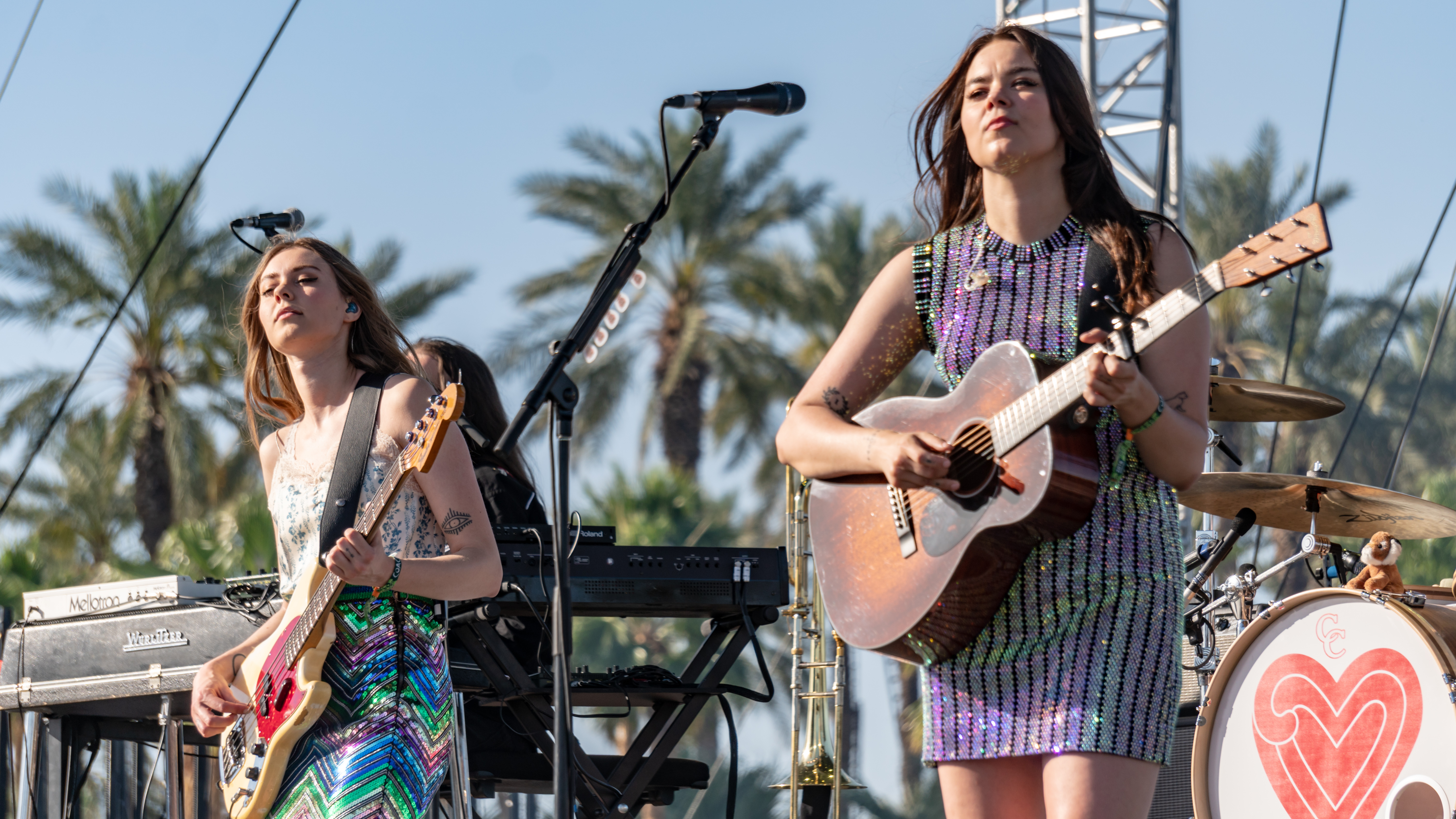 Coachella18W1-208